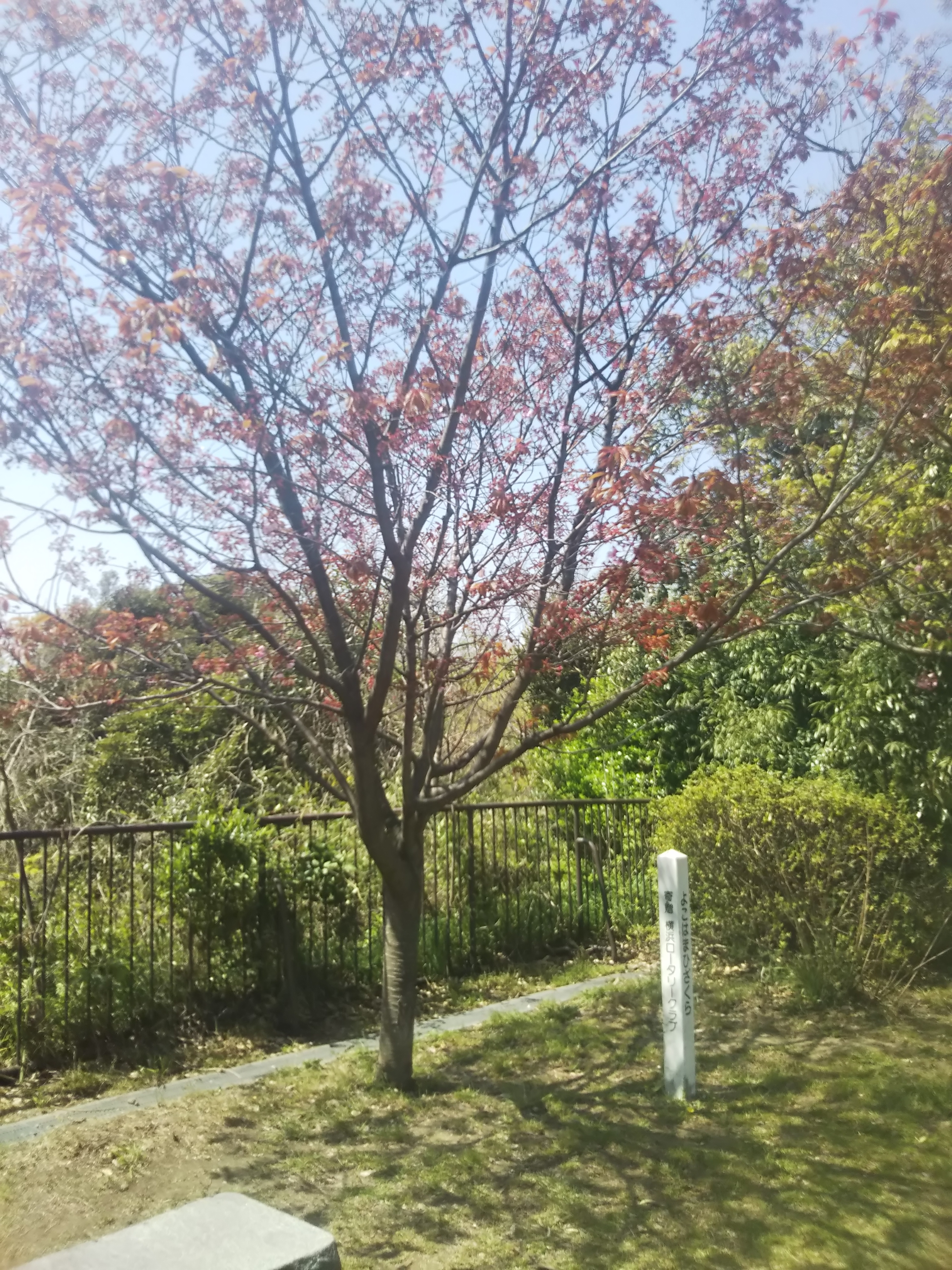 横浜市中区、本牧山頂公園内にある横浜緋桜の原木